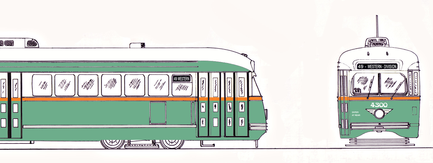 «Kleurenschema: CTA - Chicago Transit Authority : PCC Cars gebouwd door Pullman-Standard, 1946-8 : Series: 4026-4171 & 4172-4371» (originele titel) Zelfgetekend en ingekleurd m.b.v. Photoshop CS.